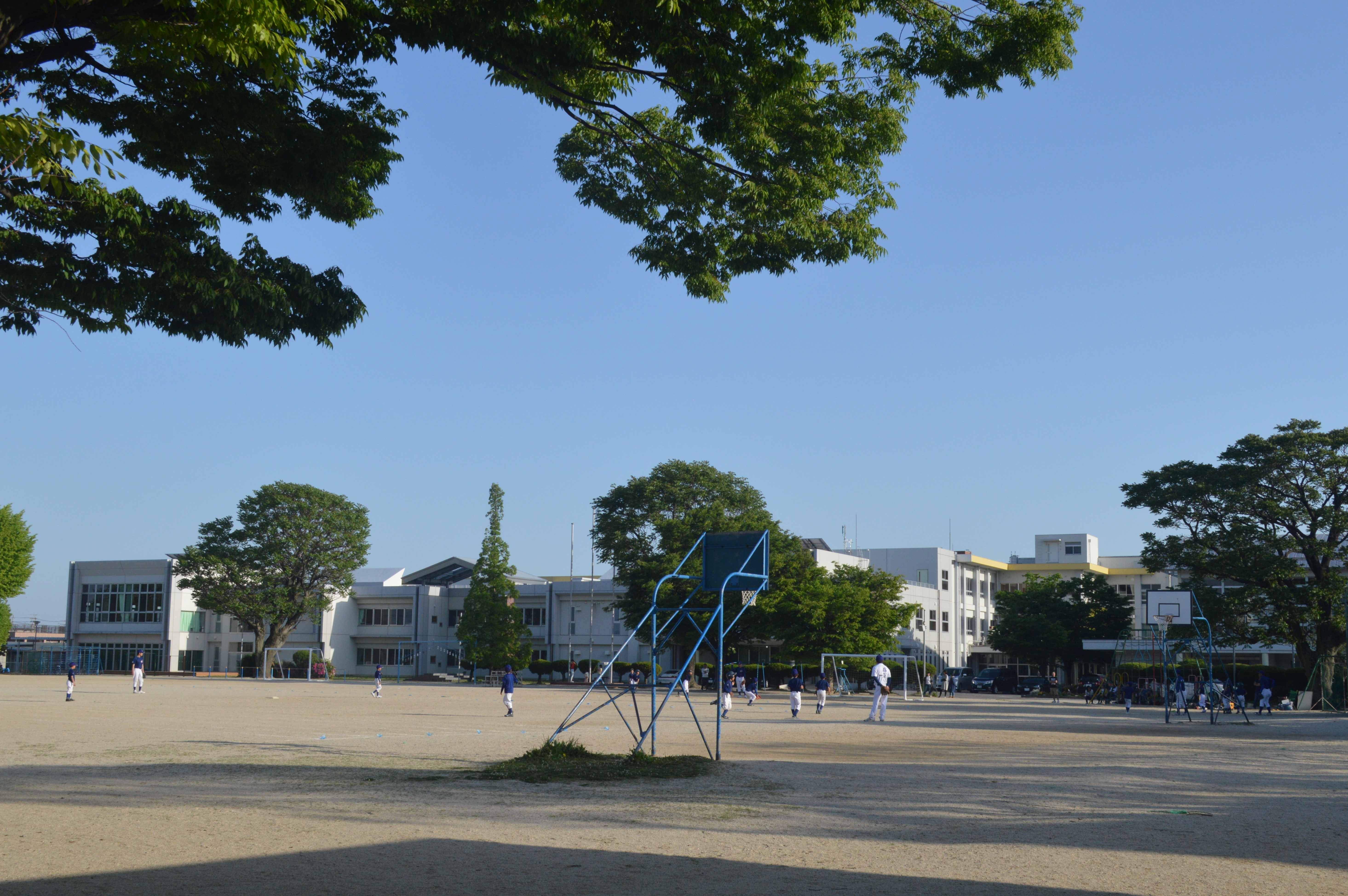 愛知県碧南市の碧南市立新川小学校。